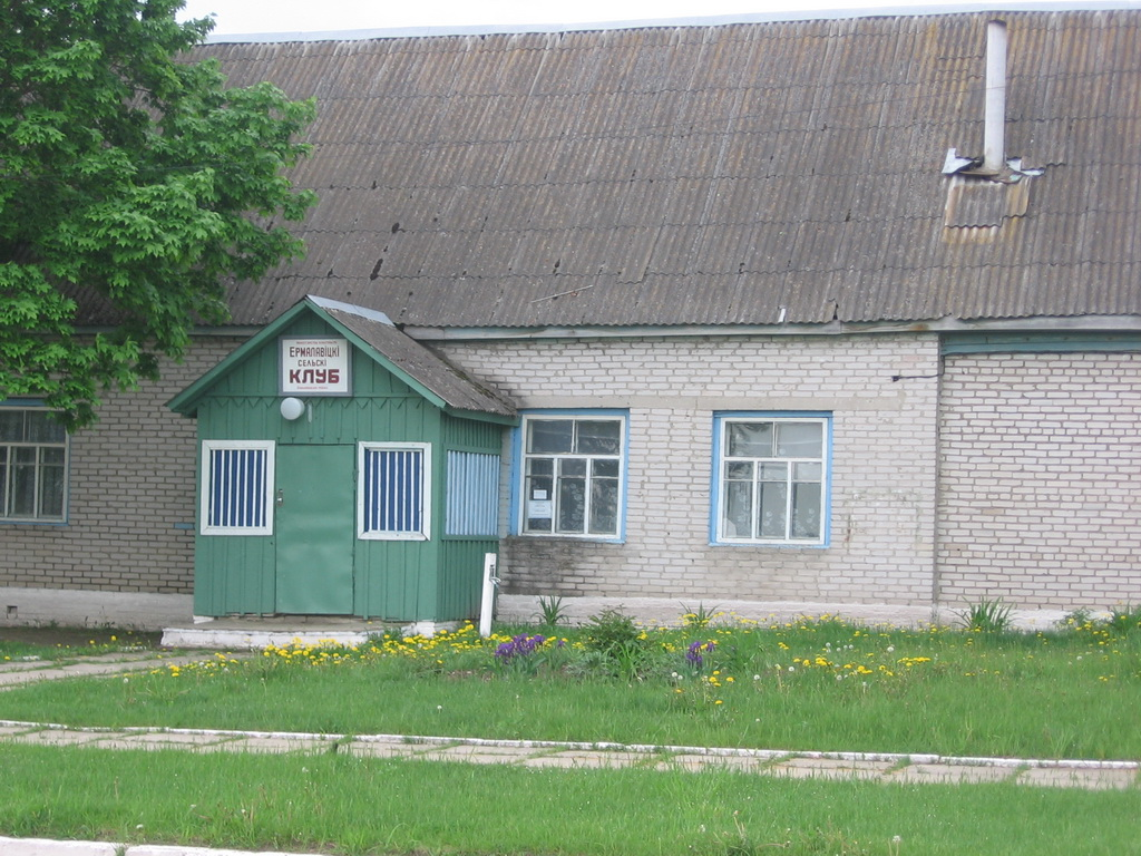 Ермоловичский сельский клуб. Внешний вид